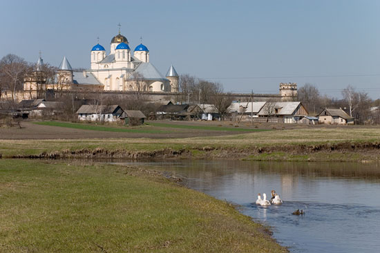 Межиріч, Острозький район, Рівненська область